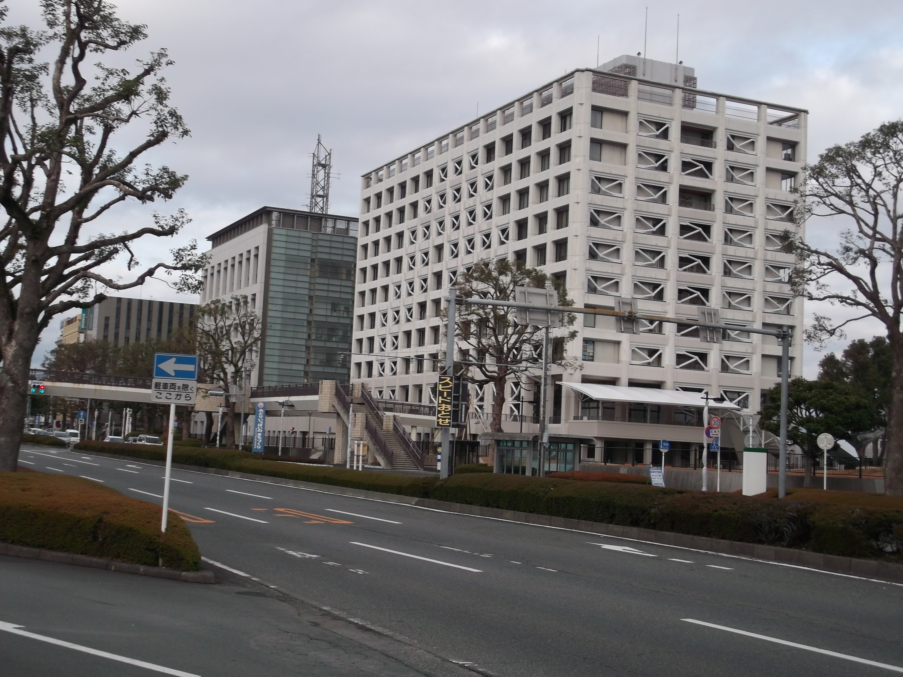 富士市役所 市庁舎・消防防災庁舎